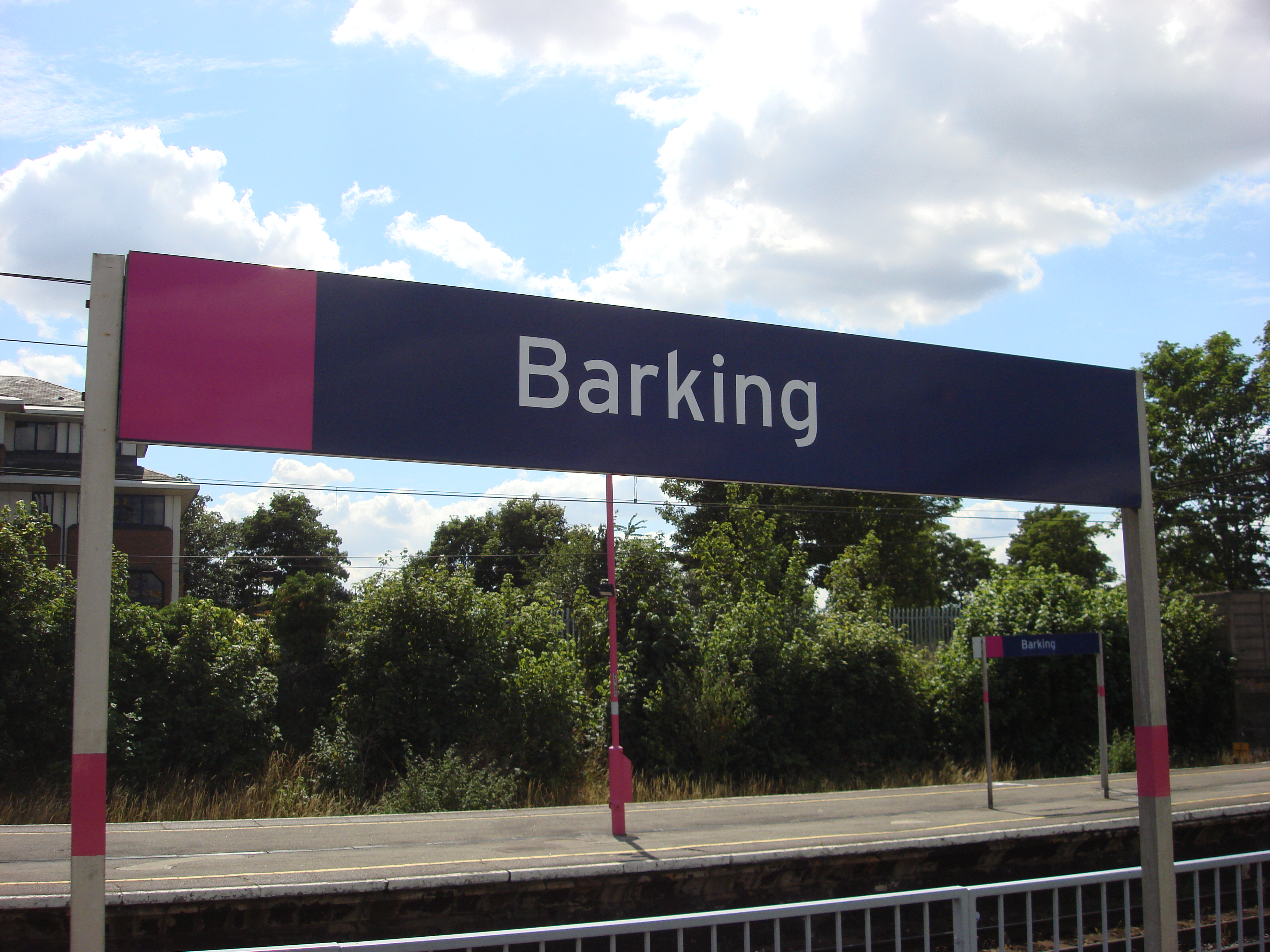 Barking station, signage